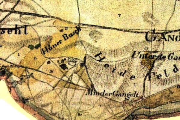 Kartenaufnahme der Rheinlande 1804/05